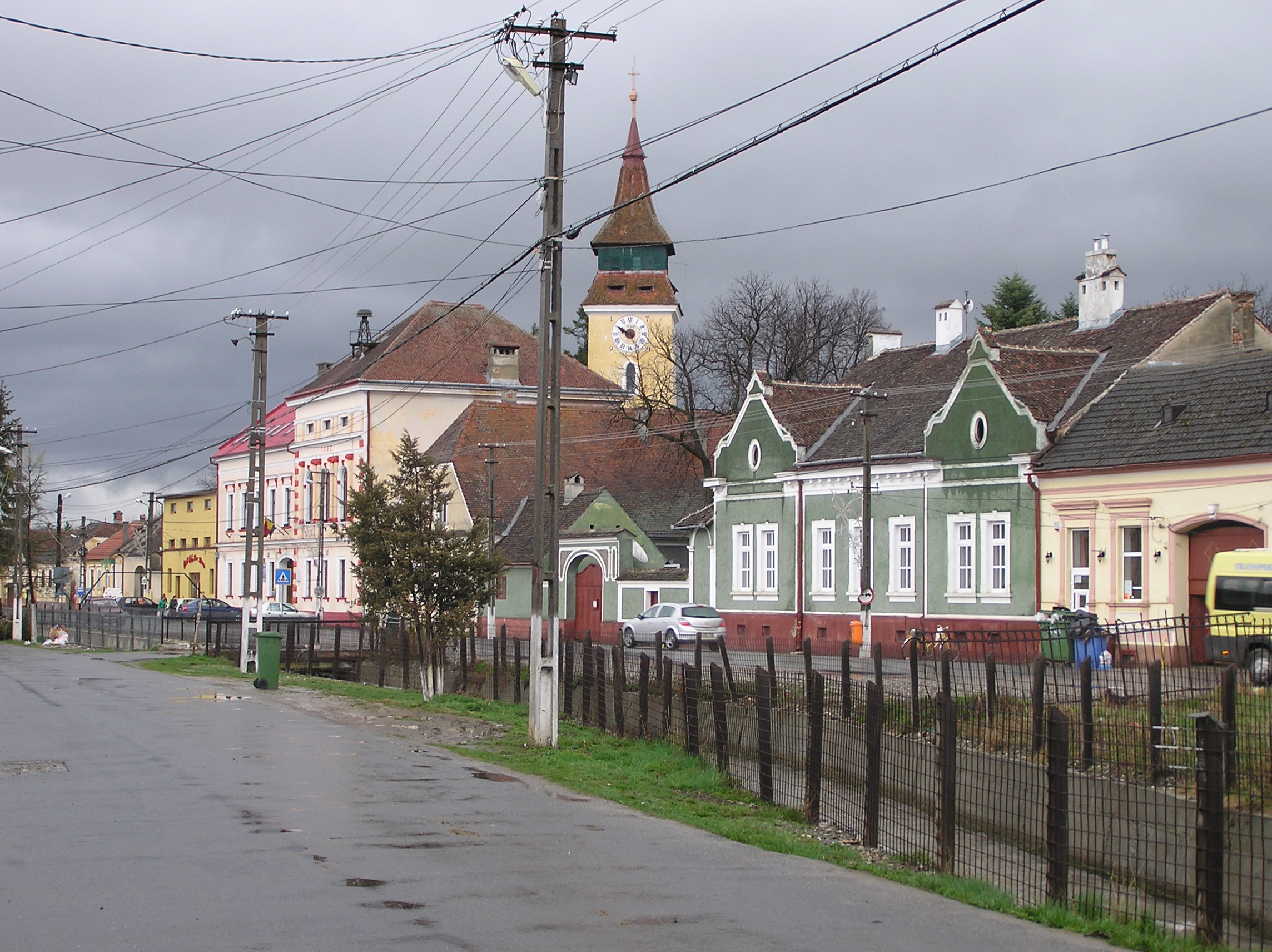 Zentrum der Gemeinde Vulcan (Wolkendorf), Burzenland, Siebenbürgen, Rumänien.